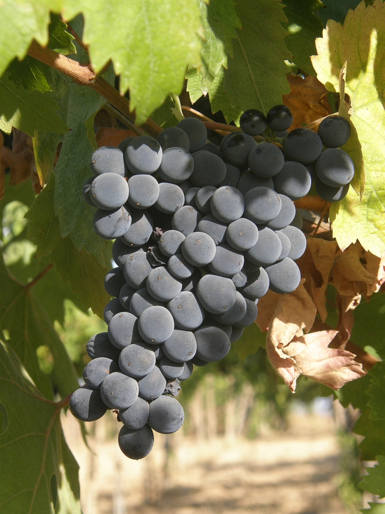 Montepulciano d'Abruzzo Centrale" in Pescara